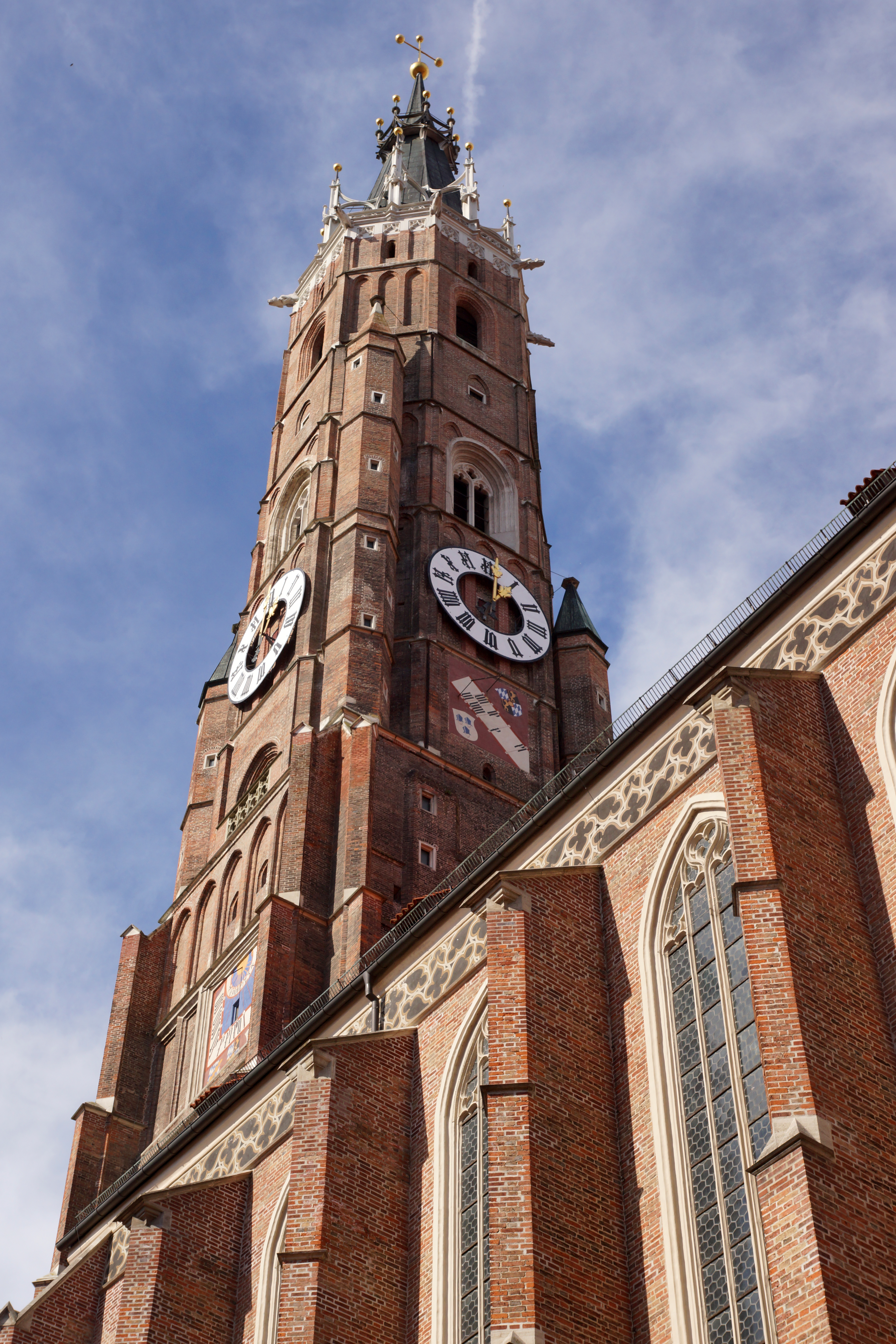 2012-10-06 Landshut 037 Altstadt, St. Martin.jpg